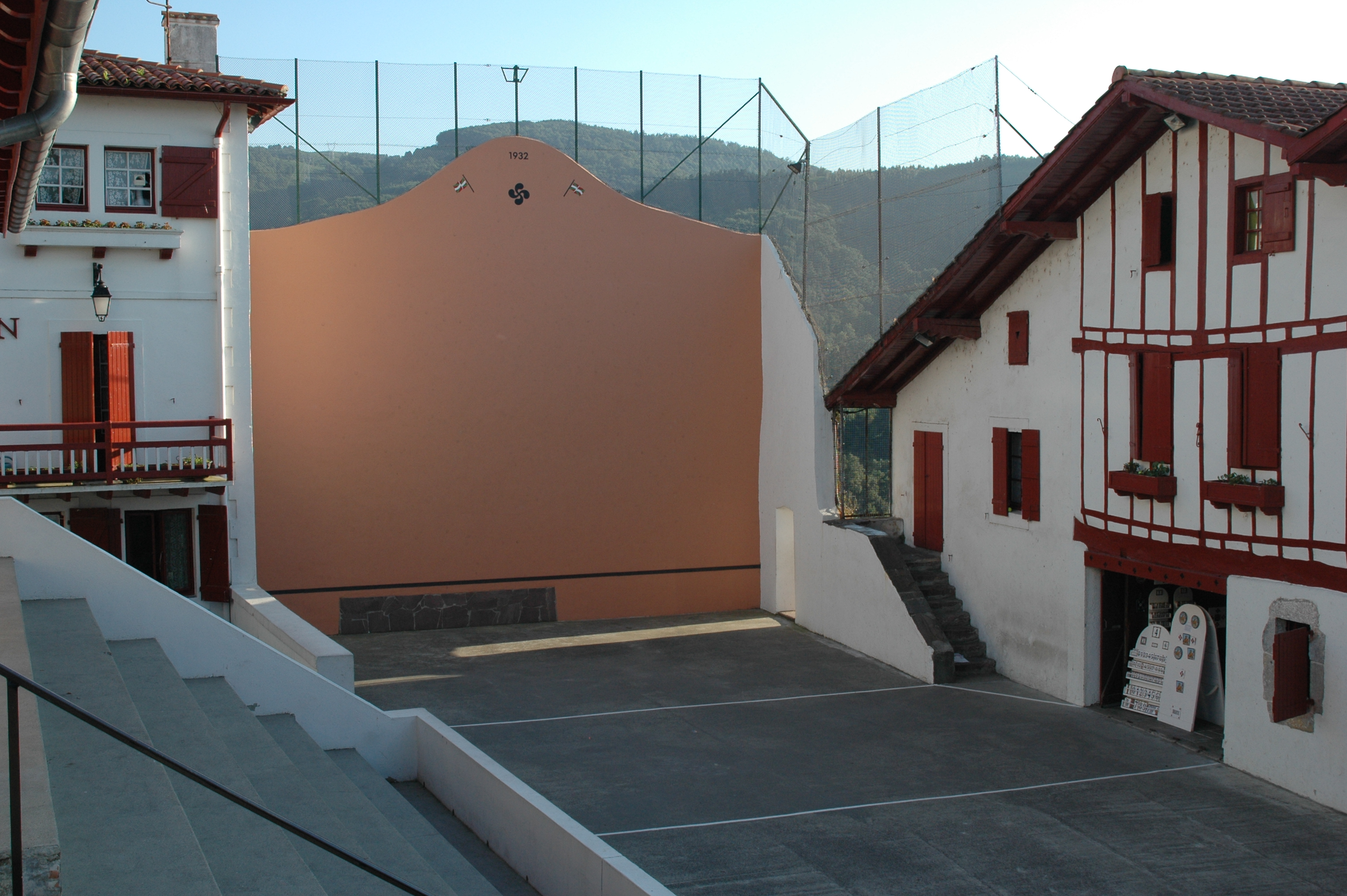 Biriatou, le fronton engoncé dans le village, avec les gradins.